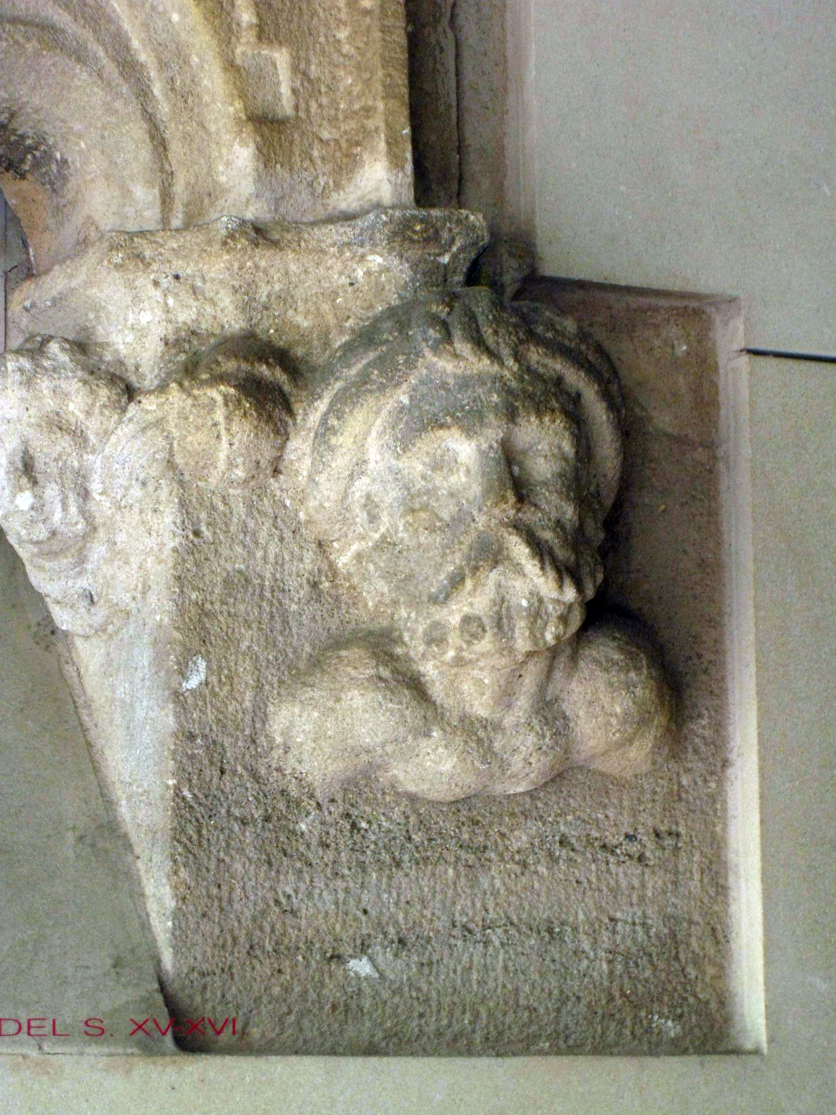 Llinda de finestra de l'antic Hostal d'Alberiques, encastada en un edifici de nova construcció a la plaça Vella núm. 17 (Terrassa). D'estil gòtic tardà (s. XIV). Detall d'un dels caps esculpits dels extrems.